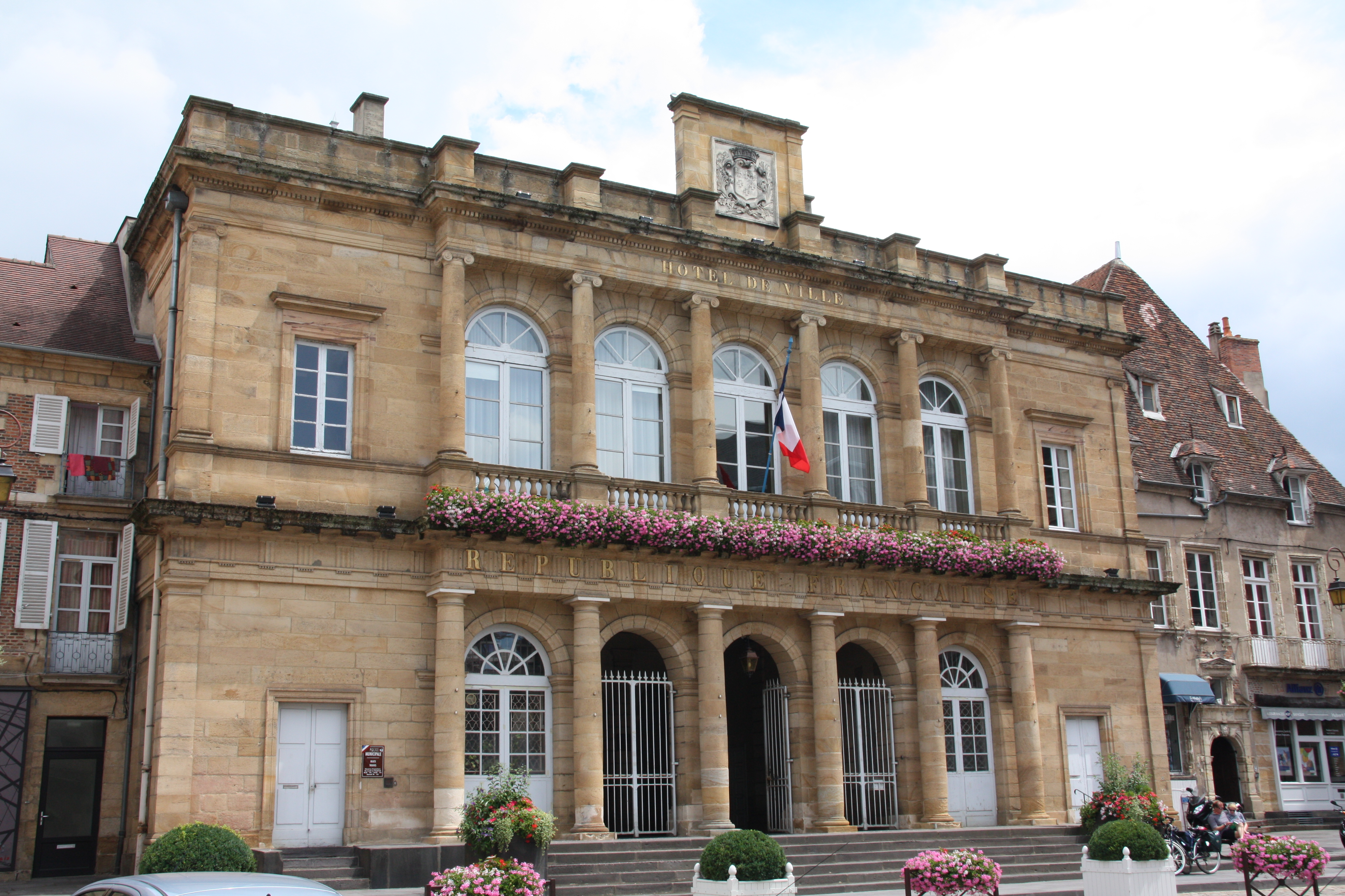 Hôtel de ville de Moulins, France.